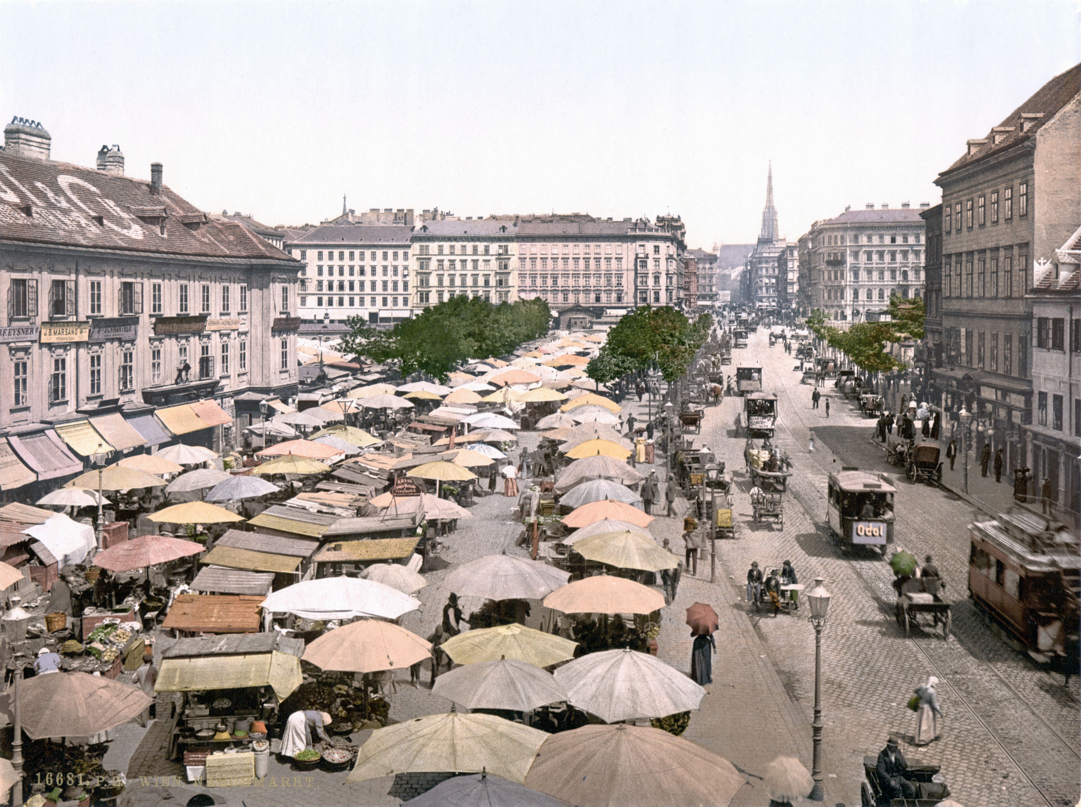 Naschmarkt in Wien um 1900